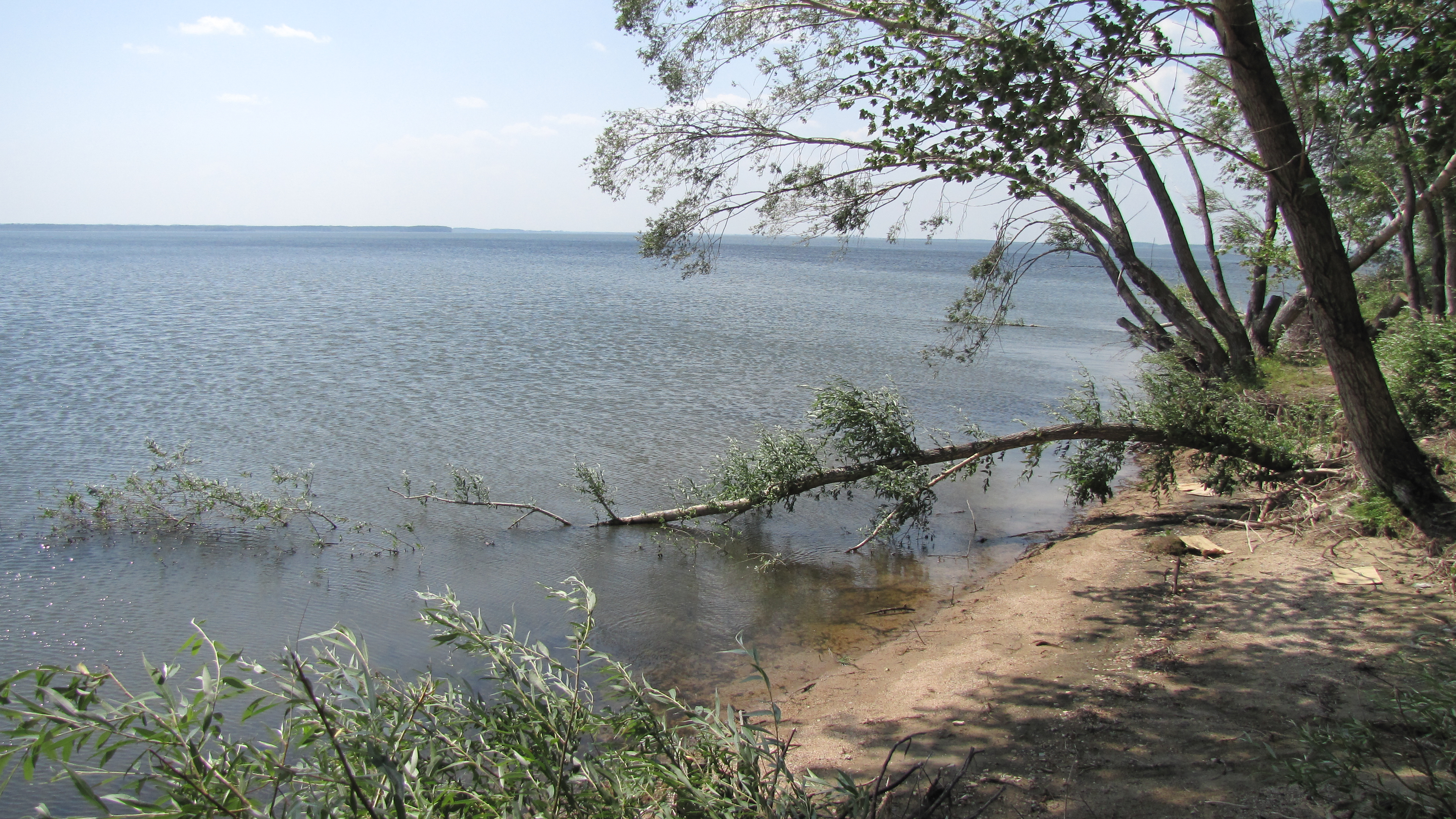 Вид на берег Гилёвского водохранилища. Лето 2011 года. (Алтайский край, Россия)